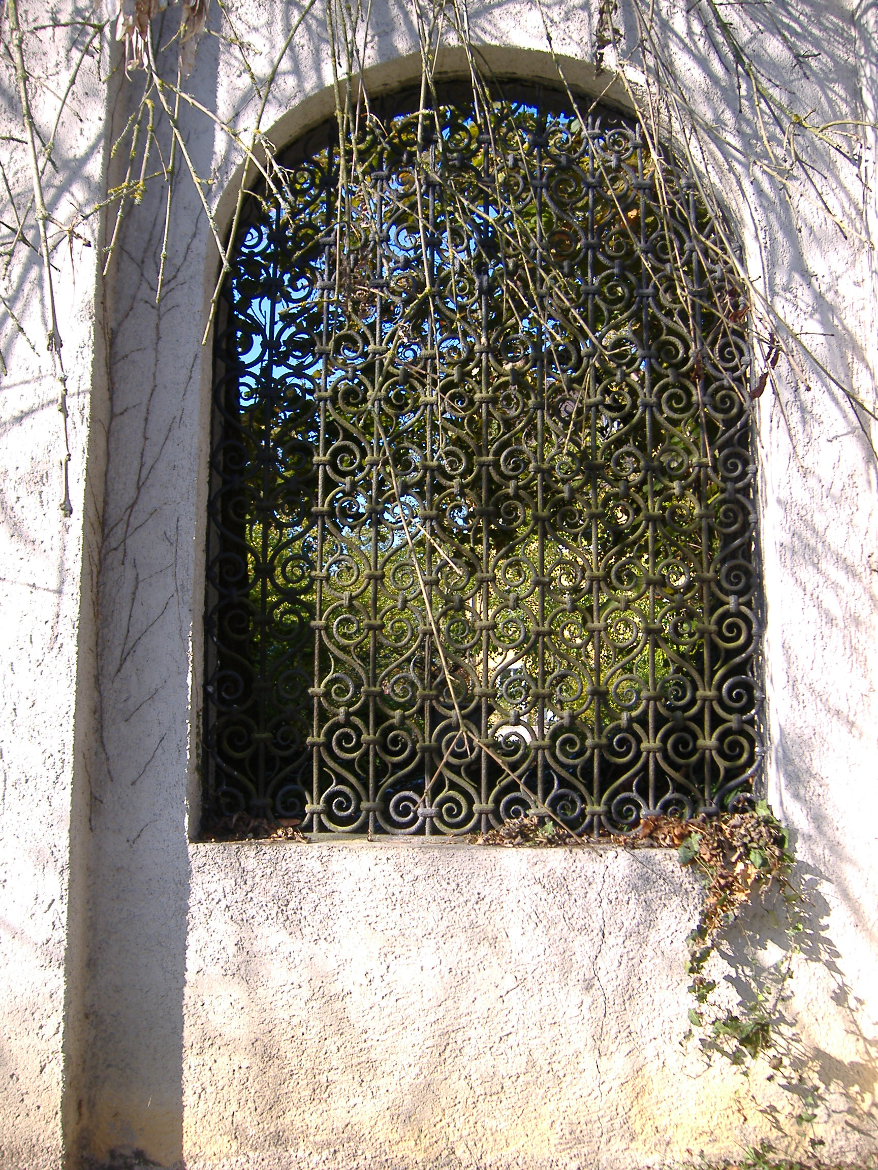 Aystetten